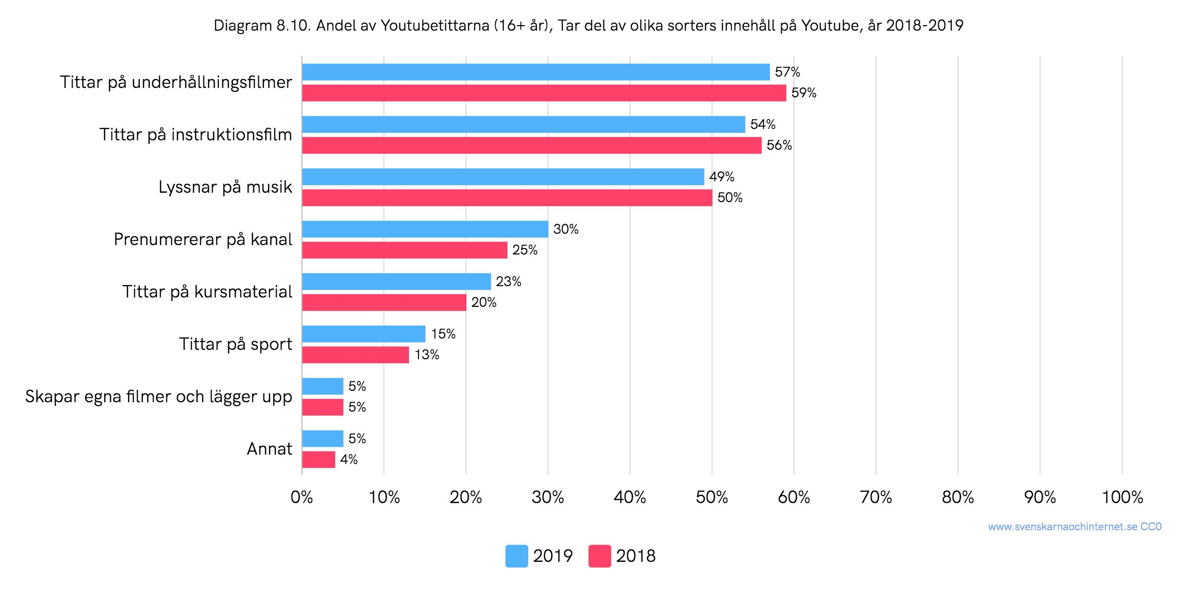 Andel av de svenska Youtubetittarna (16+ år) som tar del av olika sorters innehåll på Youtube, år 2018–2019. Siffror från undersökningen "Svenskarna och internet".